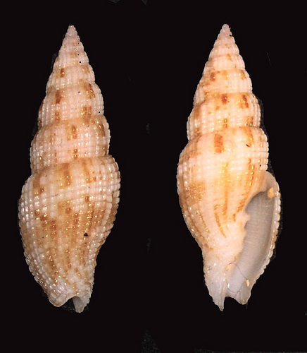 Vexillum (Costellaria) acupictum (Reeve, 1845)